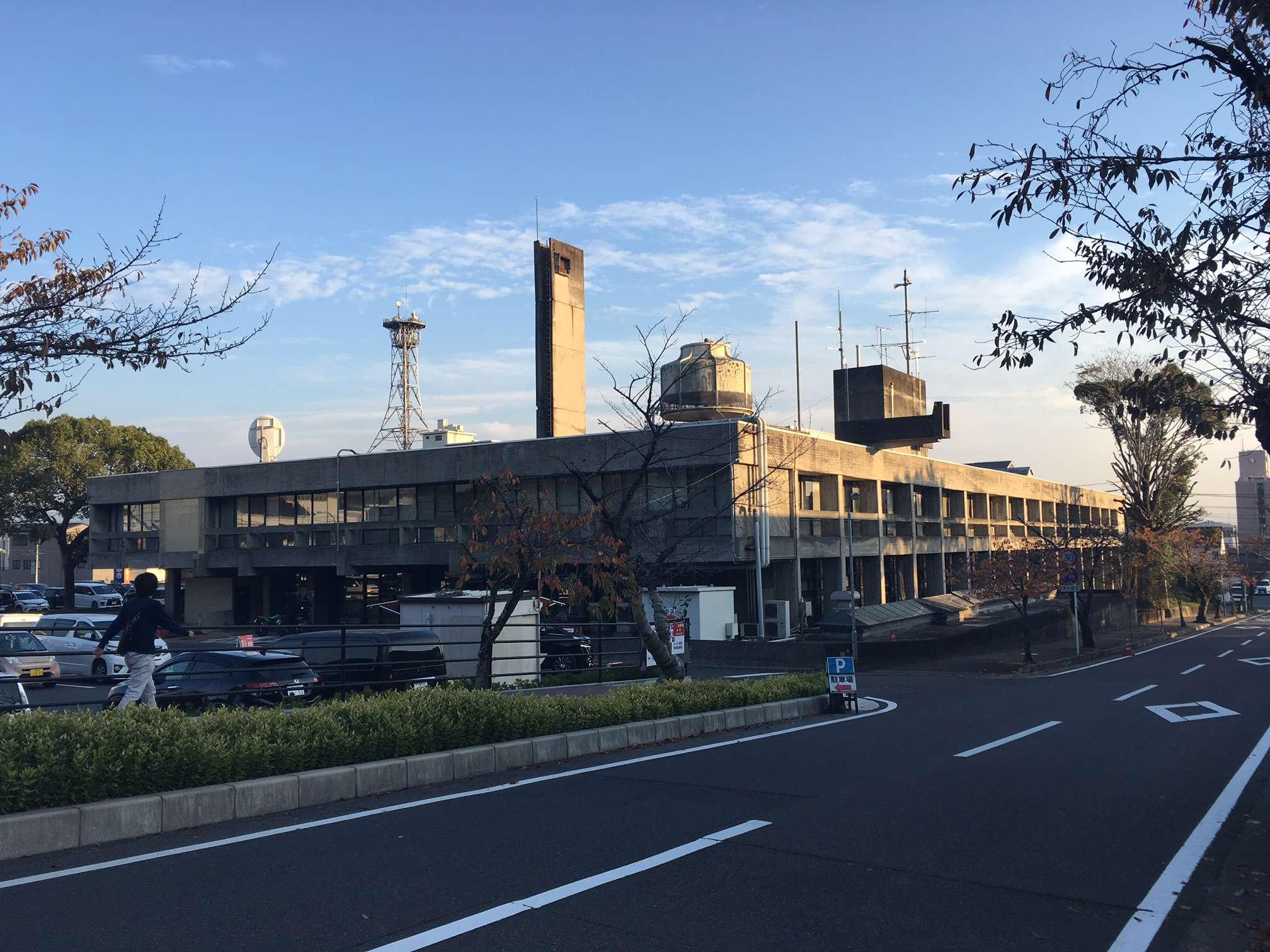 坂倉準三の建築作品